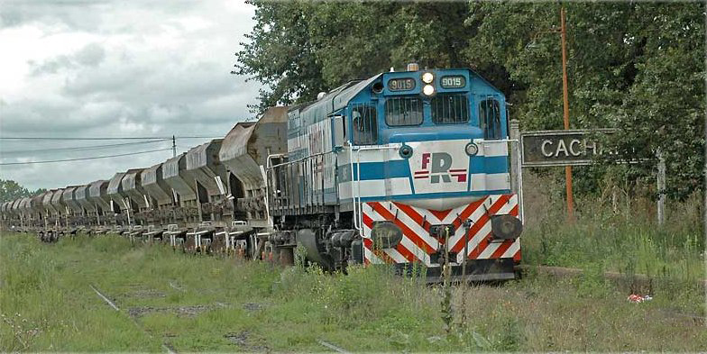 Tren carguero de Ferrosur Roca en la estación Cacharí, provincia de Buenos Aires, Argentina.